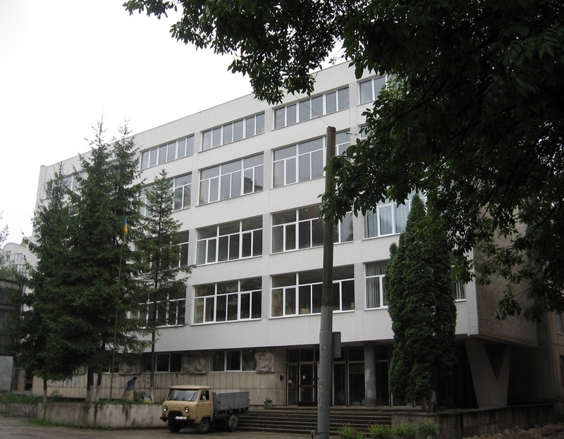 Будівля факультета прикладного митецтва Львівскої академії мистецтв